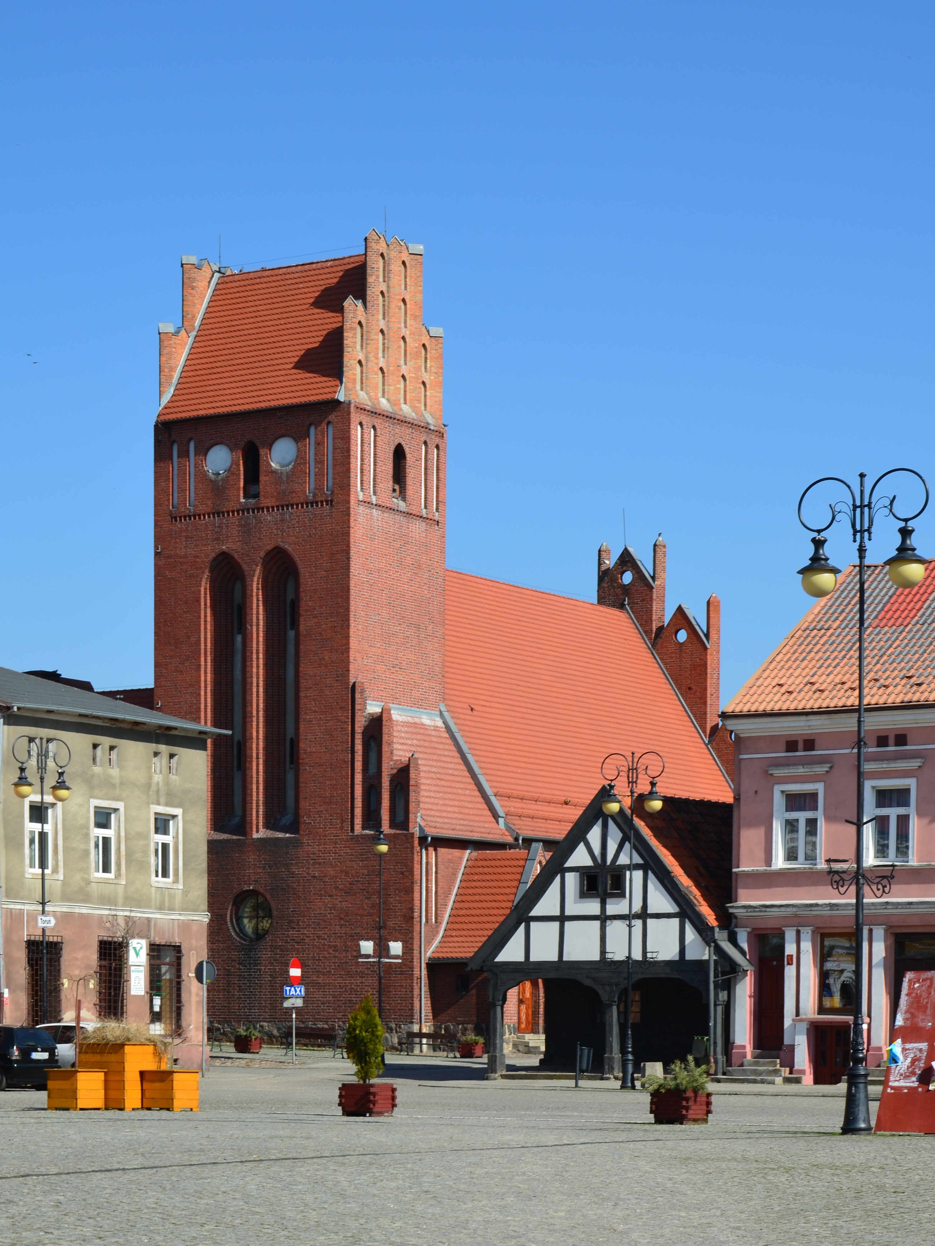 Dawny kościół ewangelicki z 1909 r., Dom "Pod Kapturem" z 1771 r.